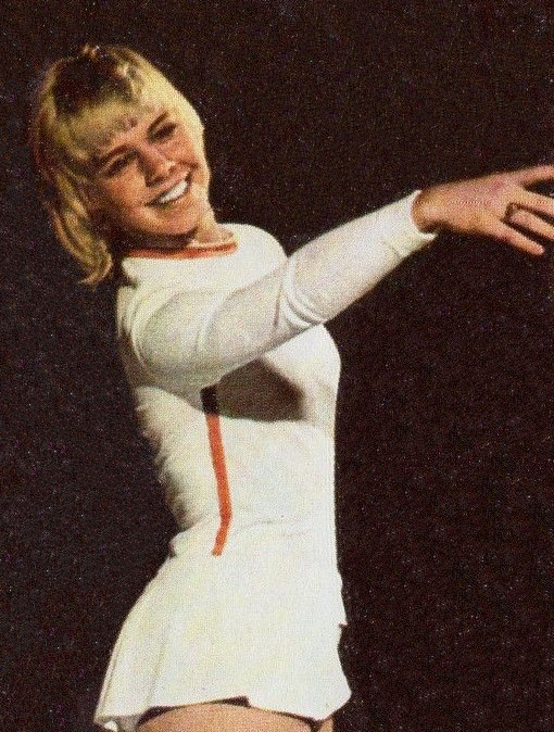 CAMPIONI dello SPORT 1973/74-Figurina n.193- LYNN - USA -PATT.GHIACCIO